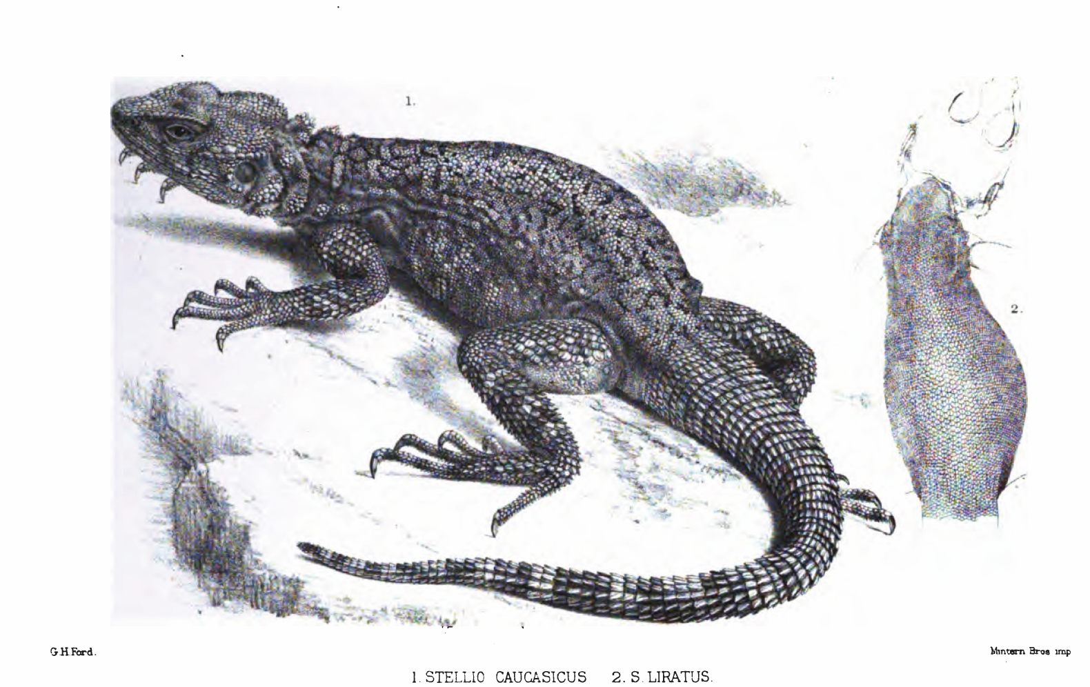 Stellio caucasicus = Laudakia caucasia